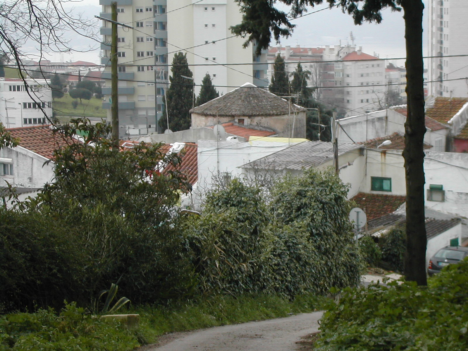 Antigo moinho integrado no casario do Bairro do Caramão, Ajuda, Lisboa